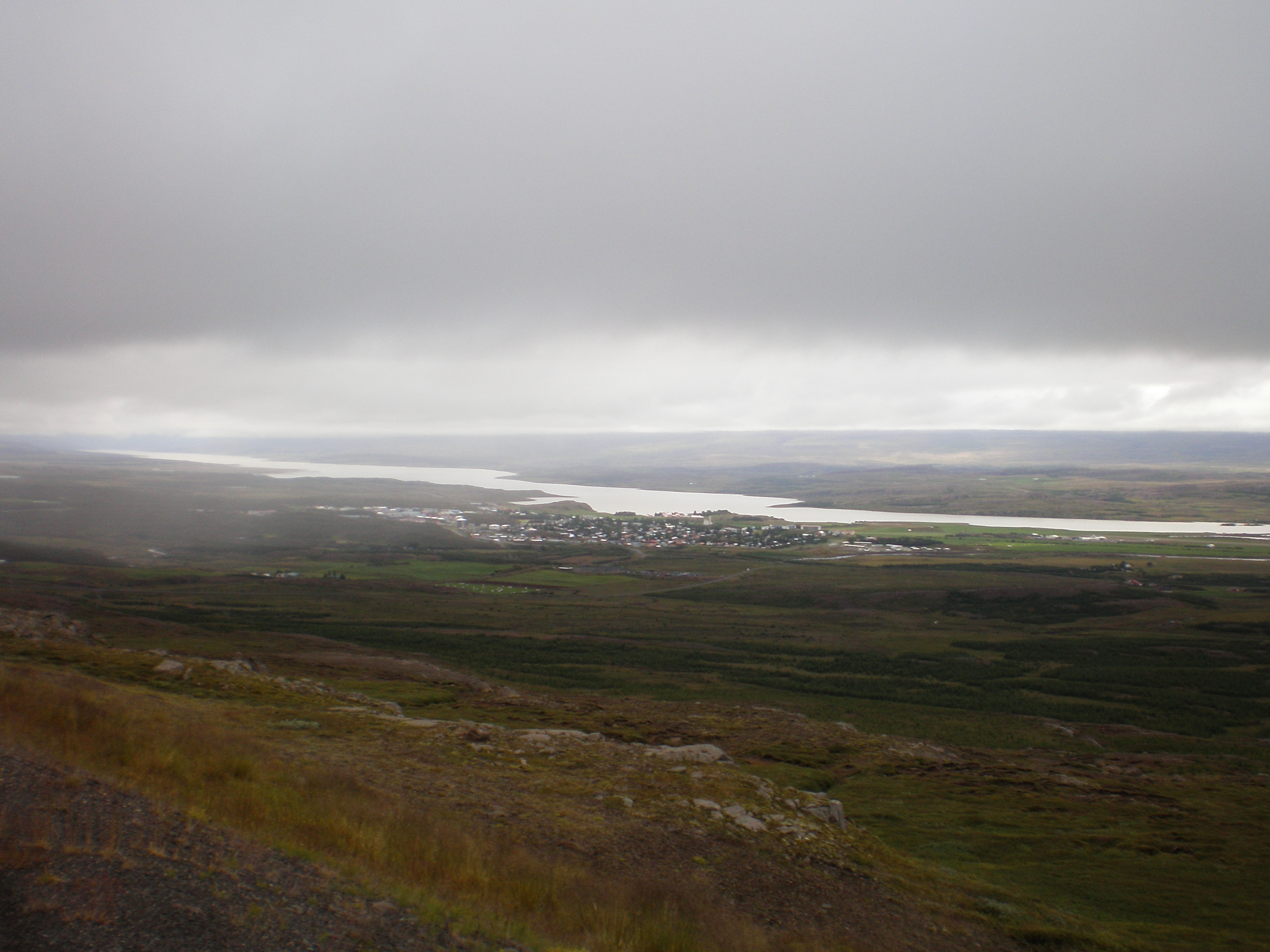 Egilsstadir - Iceland